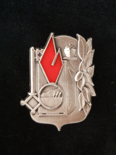 Insigne de l'Établissement du Matériel de Miramas